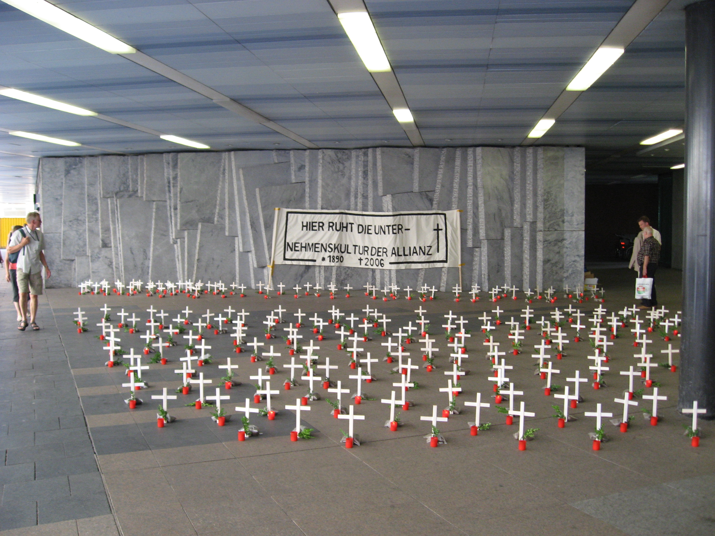 Protestaktion vor der Hamburger Niederlassung der Allianz